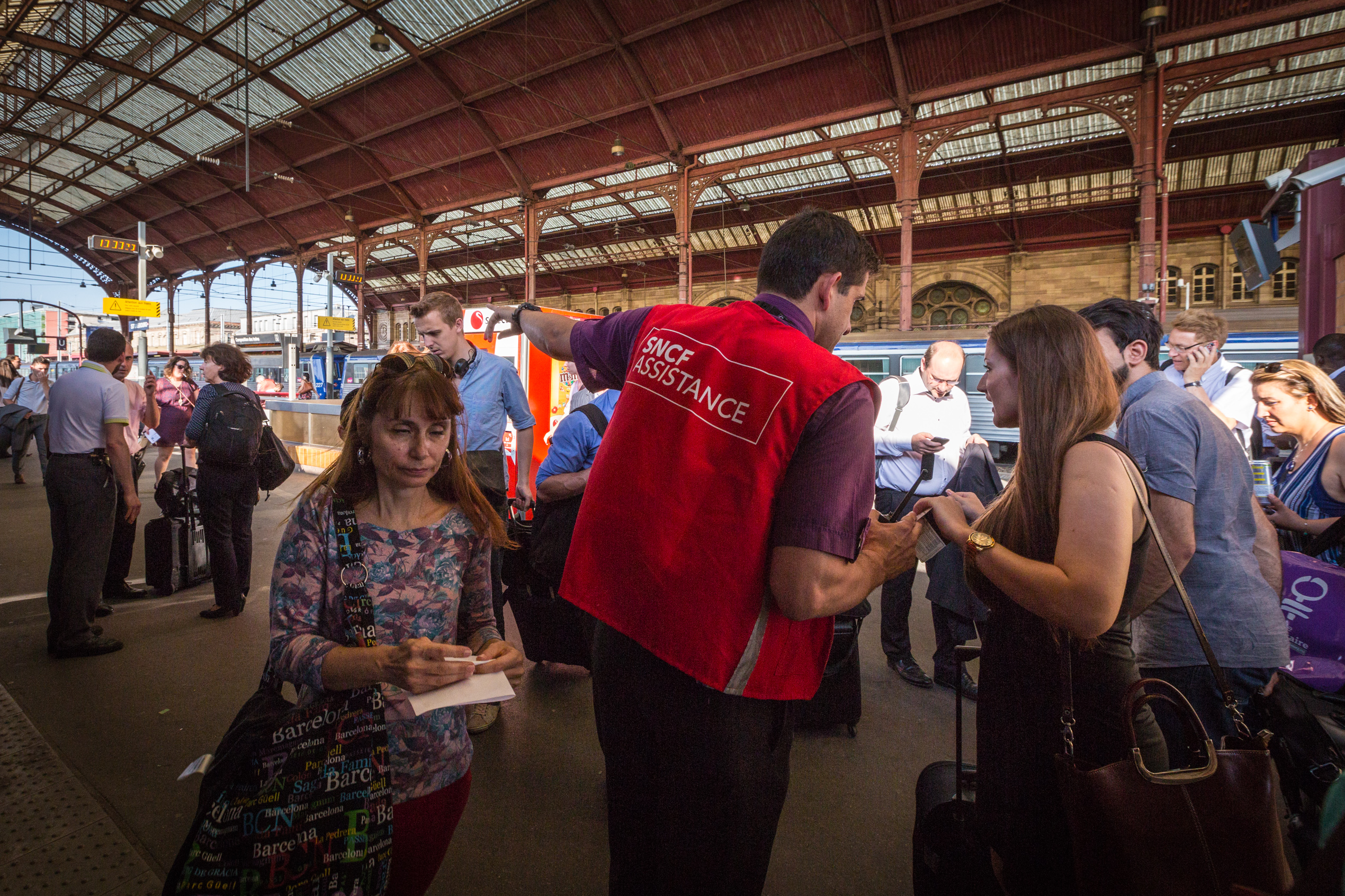 Gilets rouges en gare de Strasbourg lors du mouvement social de juin 2014